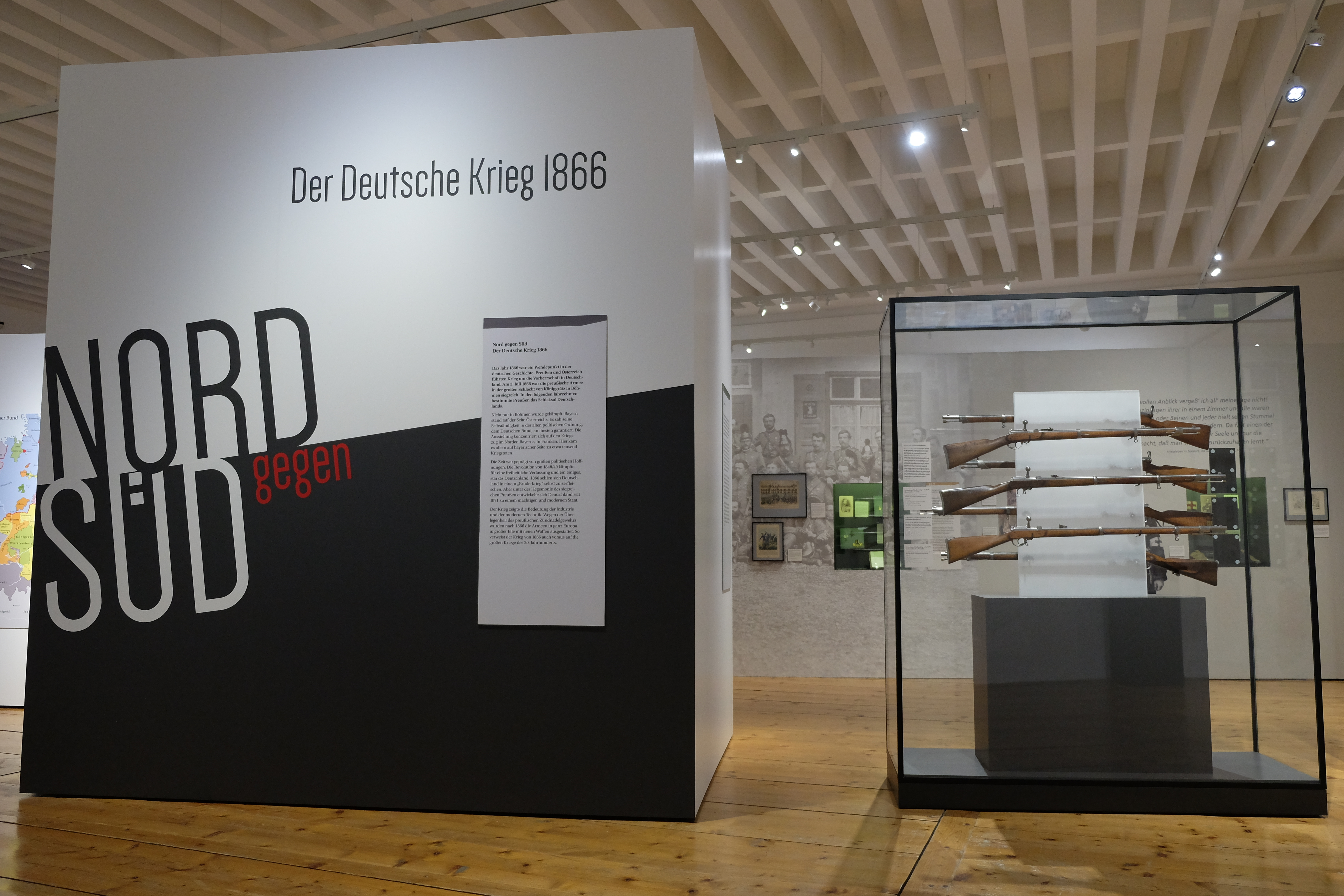 Nord gegen Süd 01